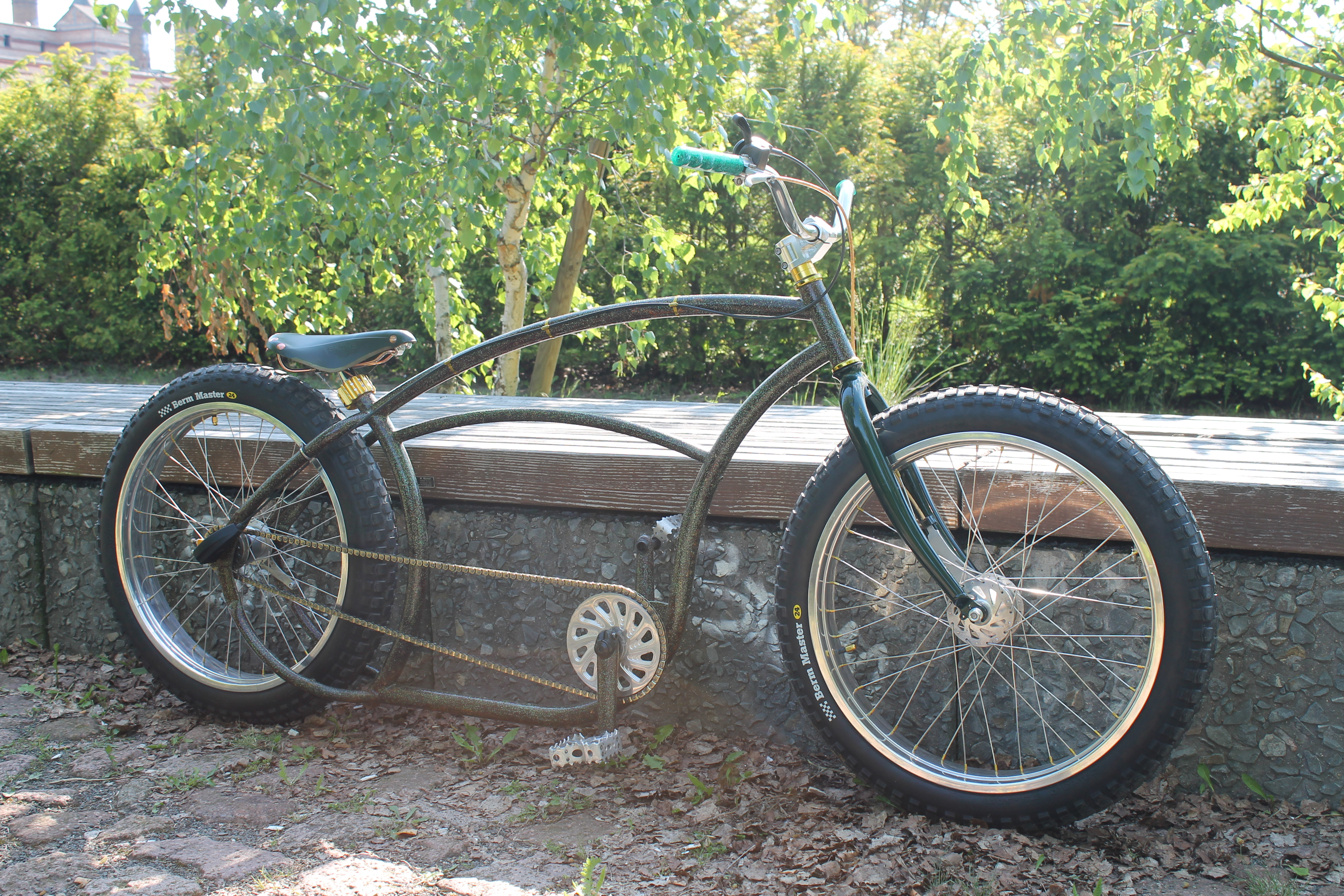 Custombikeaufbau eines Project346 "Basman" Rahmens